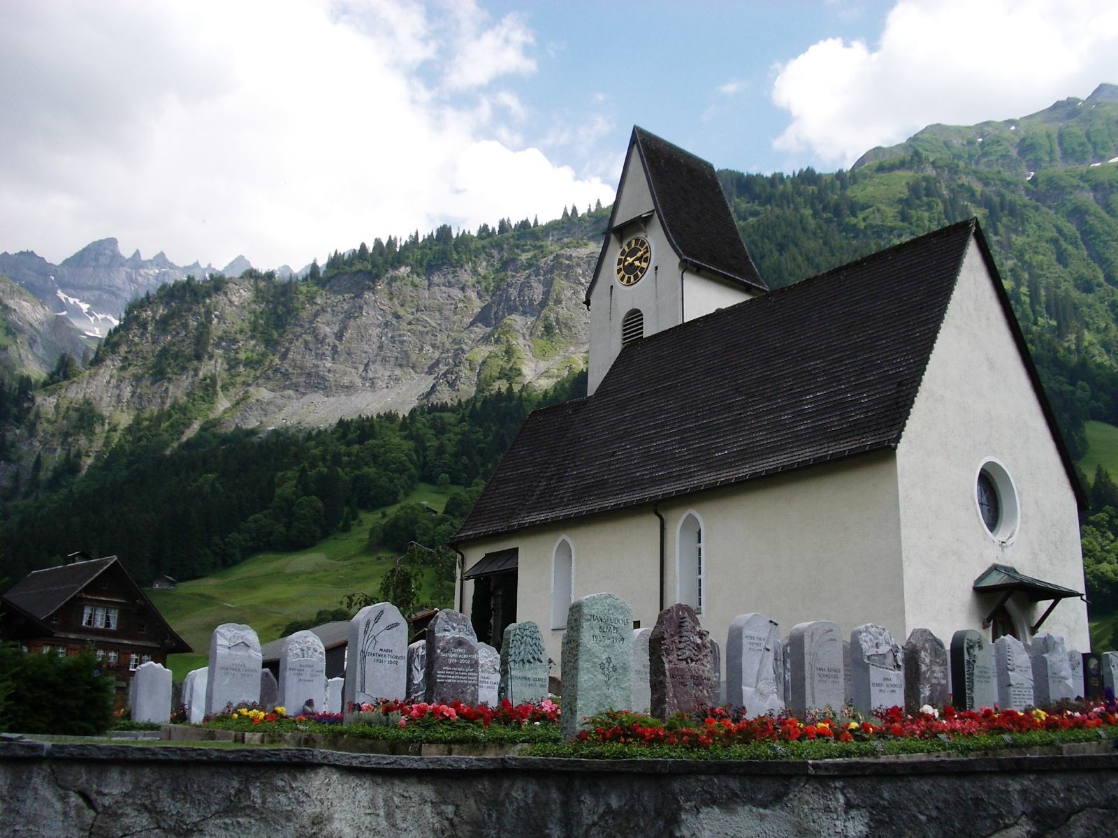 Elm GL, Switzerland self-made, June 2006